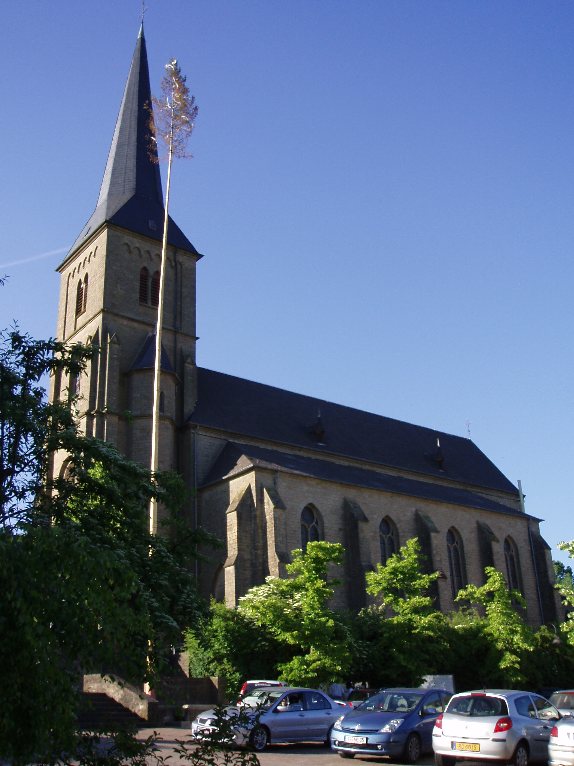 Kirche St. Dionysius in Trierweiler